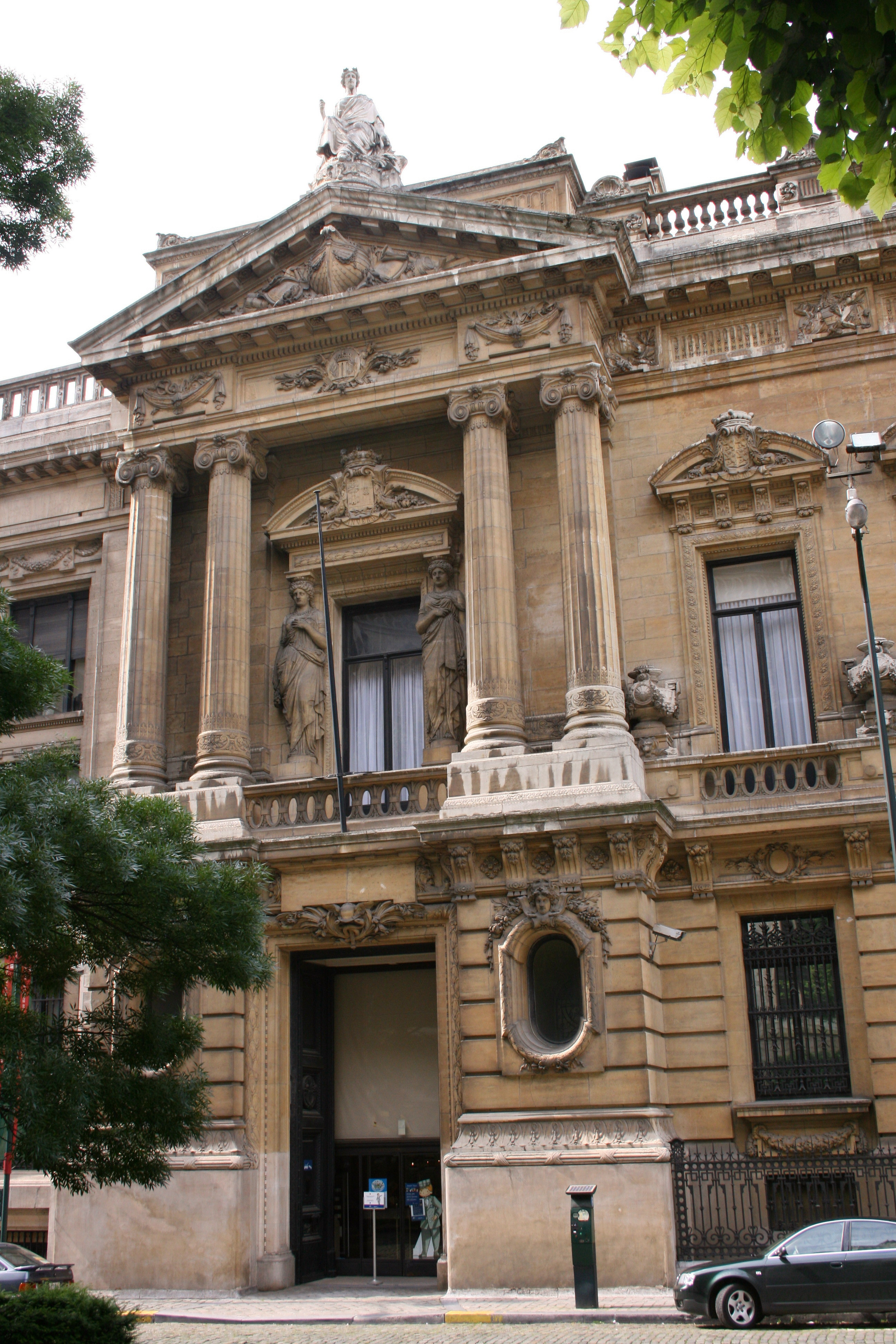 Un des avant-corps de l'Hôtel du gouverneur de la Banque nationale de Belgique, rue du Bois Sauvage à Bruxelles. Il abrite actuellement le Musée de la Banque nationale.